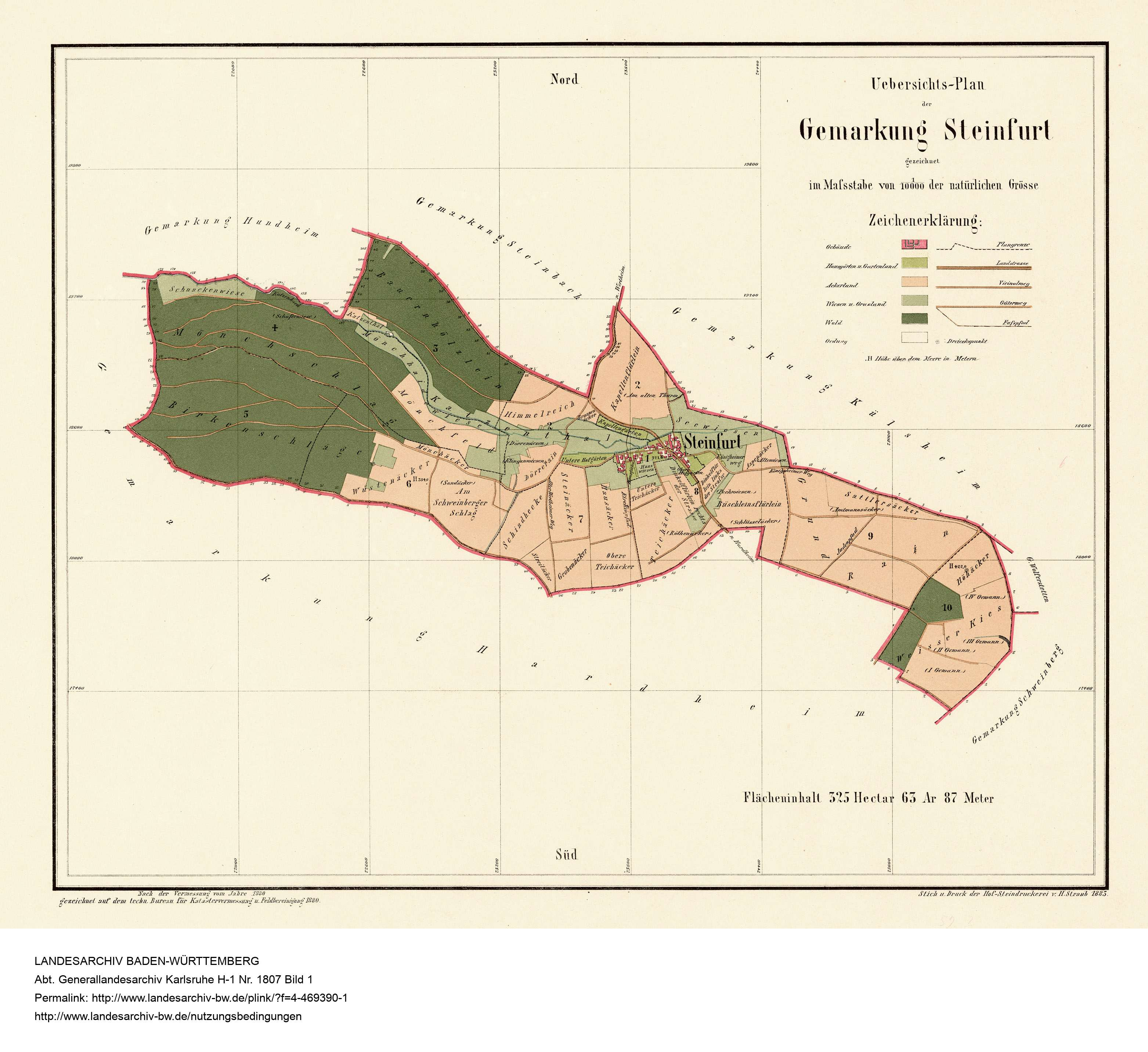 Steinfurt (Külsheim) Gemarkungsübersichtsplan (1880-1883)